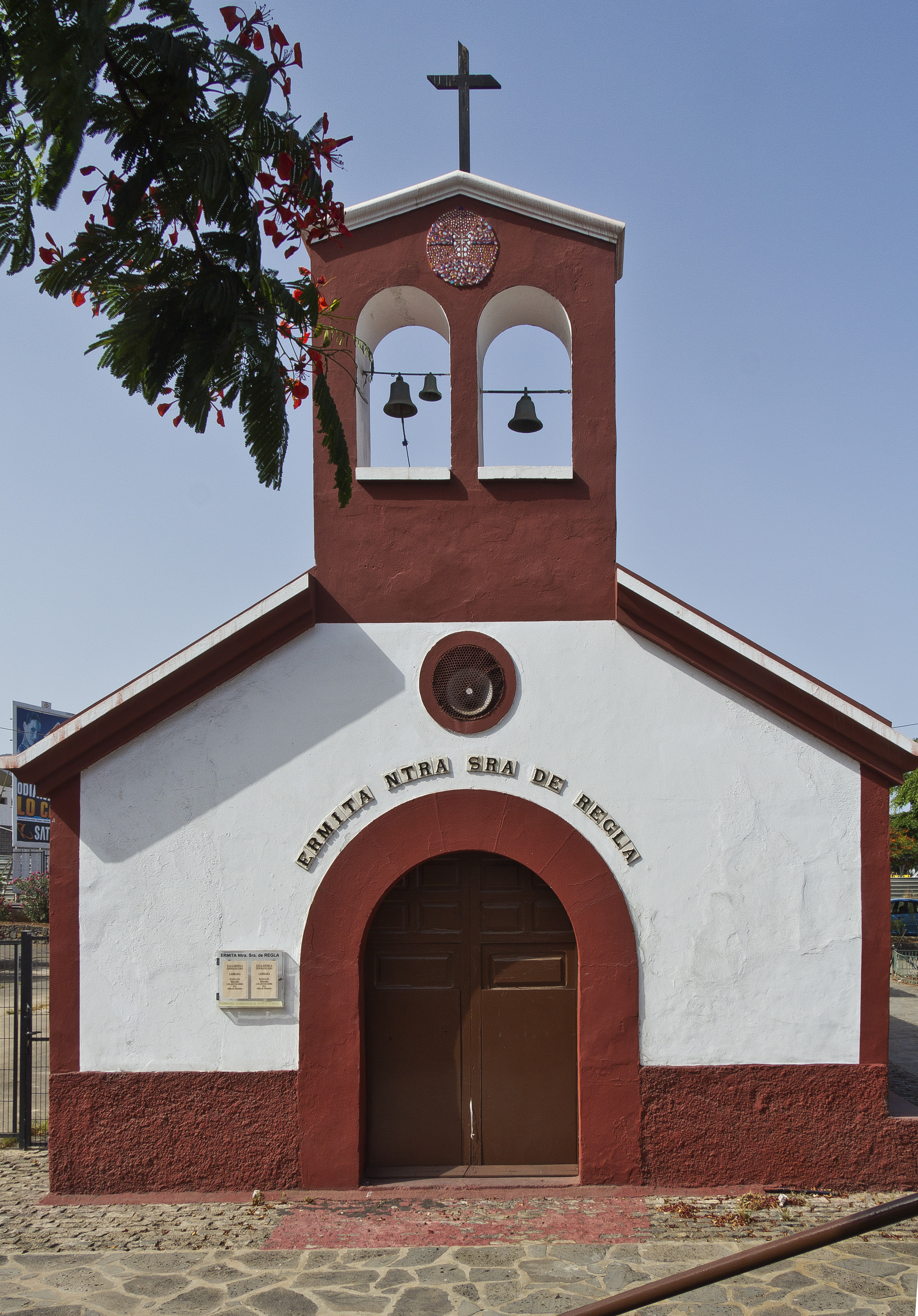 Die Ermita de Regla wurde im 17. Jahrhundert als Garnisonskirche für das Castillo de San Juan in Santa Cruz de Tenerife errichtet.